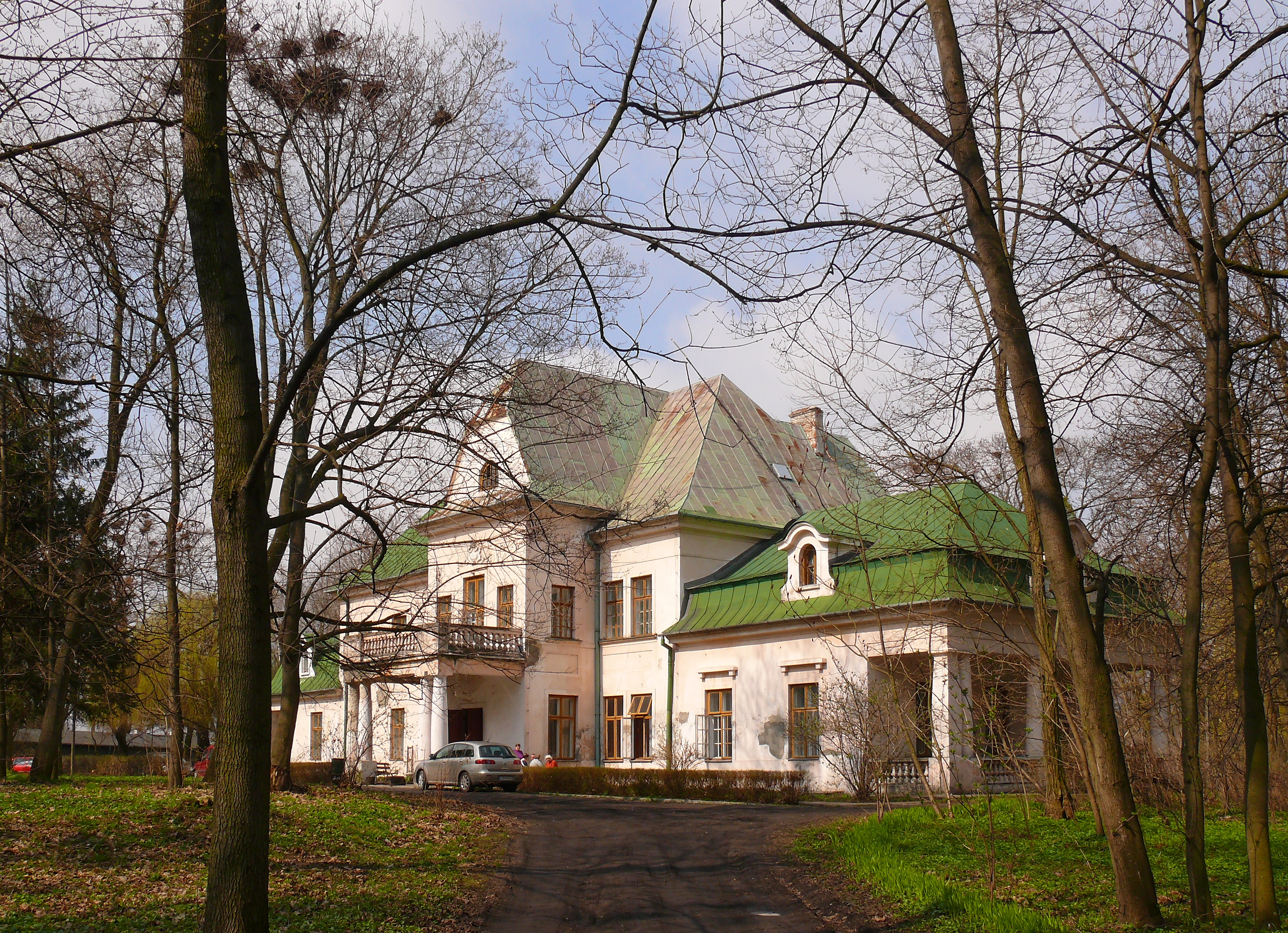 Pałacyk na terenie dawnego majątku w Łysołajach, użytkowany przez NFOZ